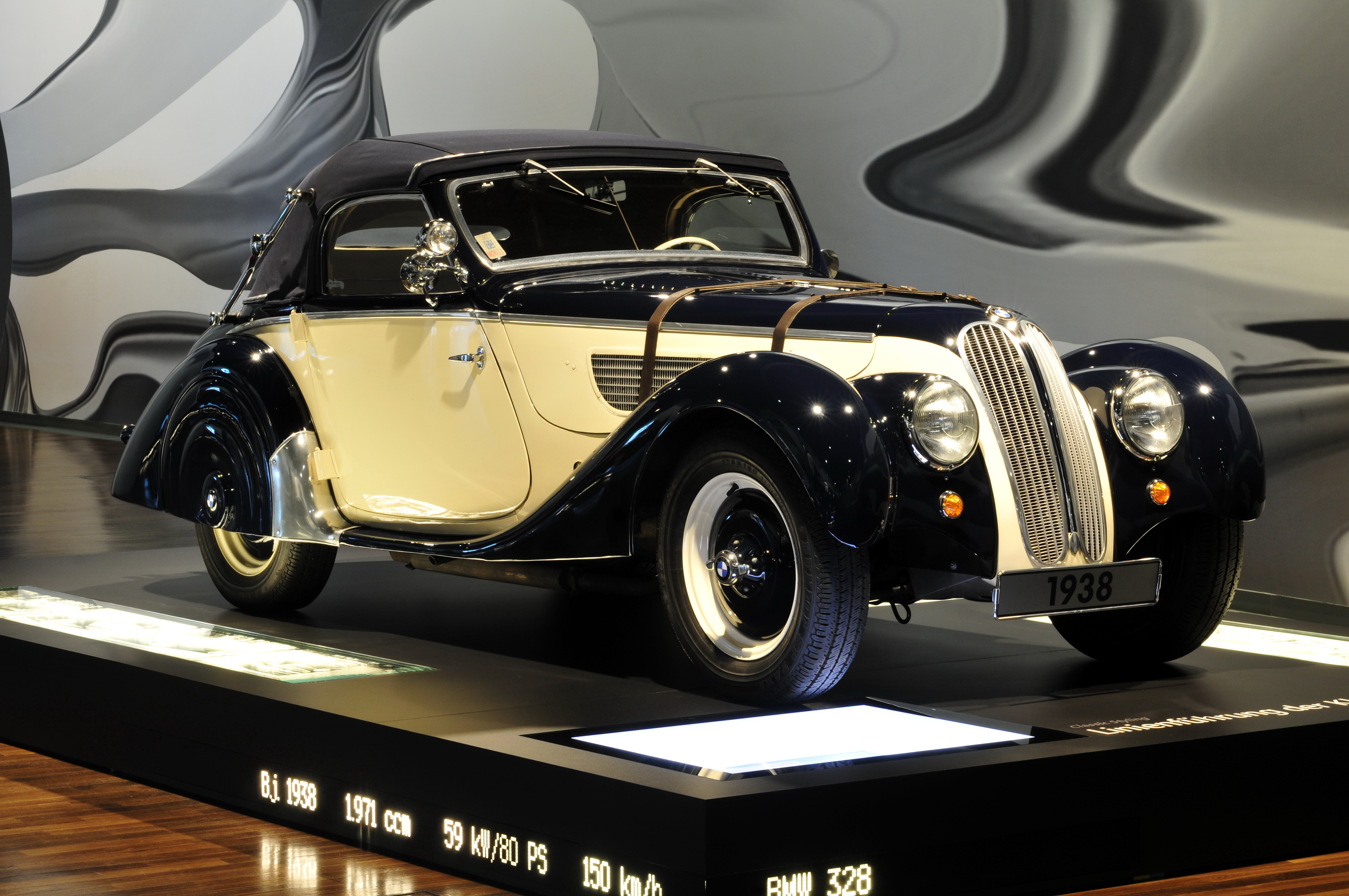 Zeithaus in der Autostadt Wolfsburg